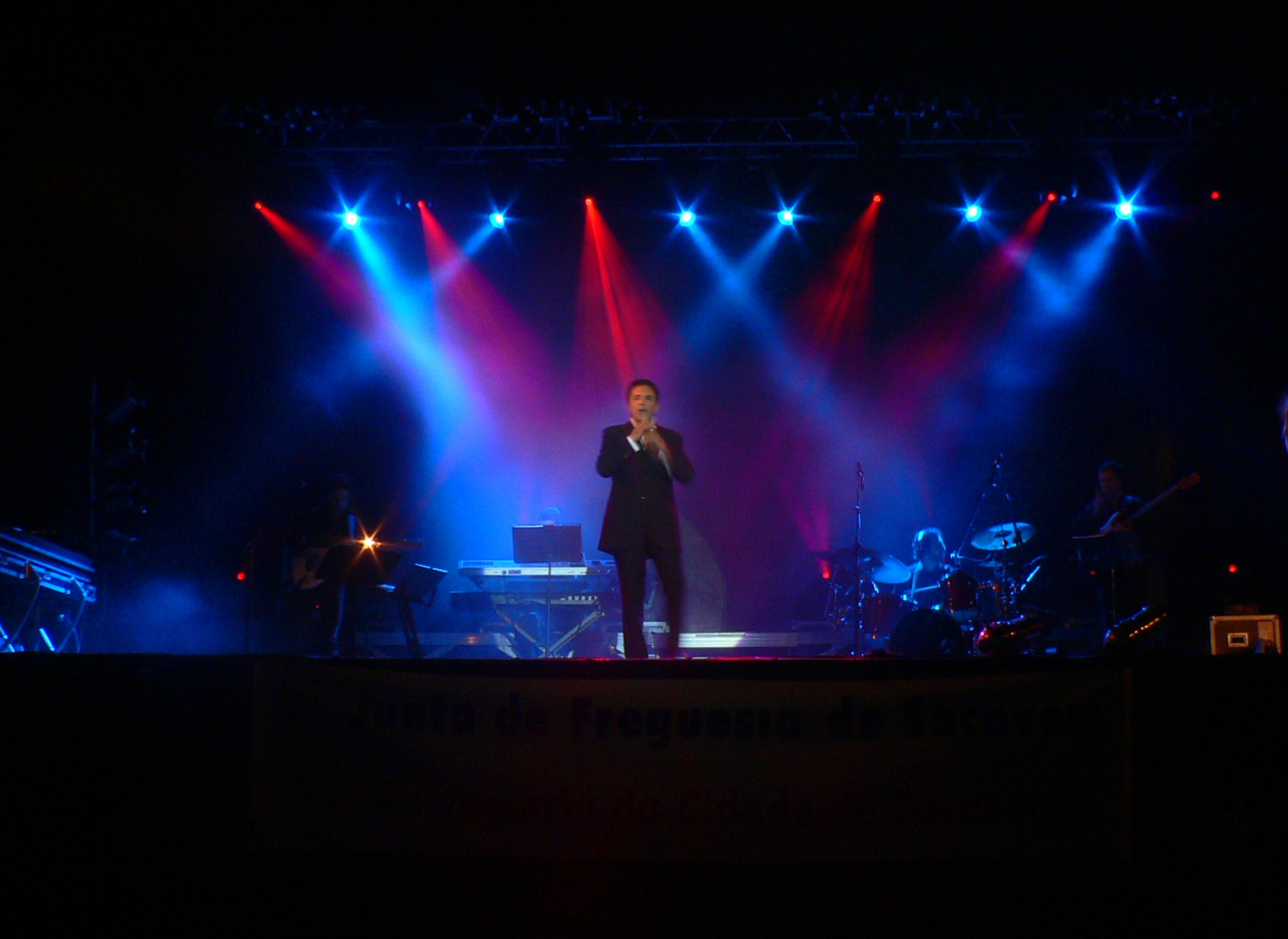 Fernando Pereira - Espectáculo em Sacavém